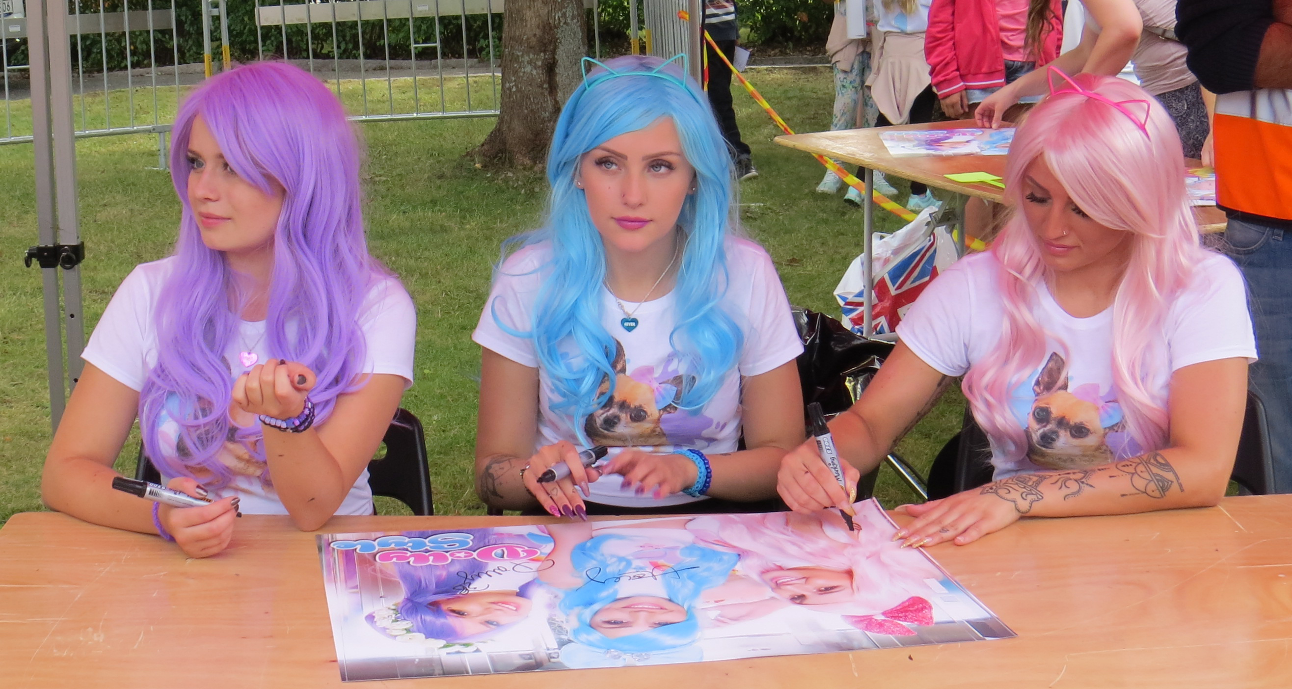 Dolly Style signerar affischer vid VOX-festivalen i Örebro 21 augusti 2016